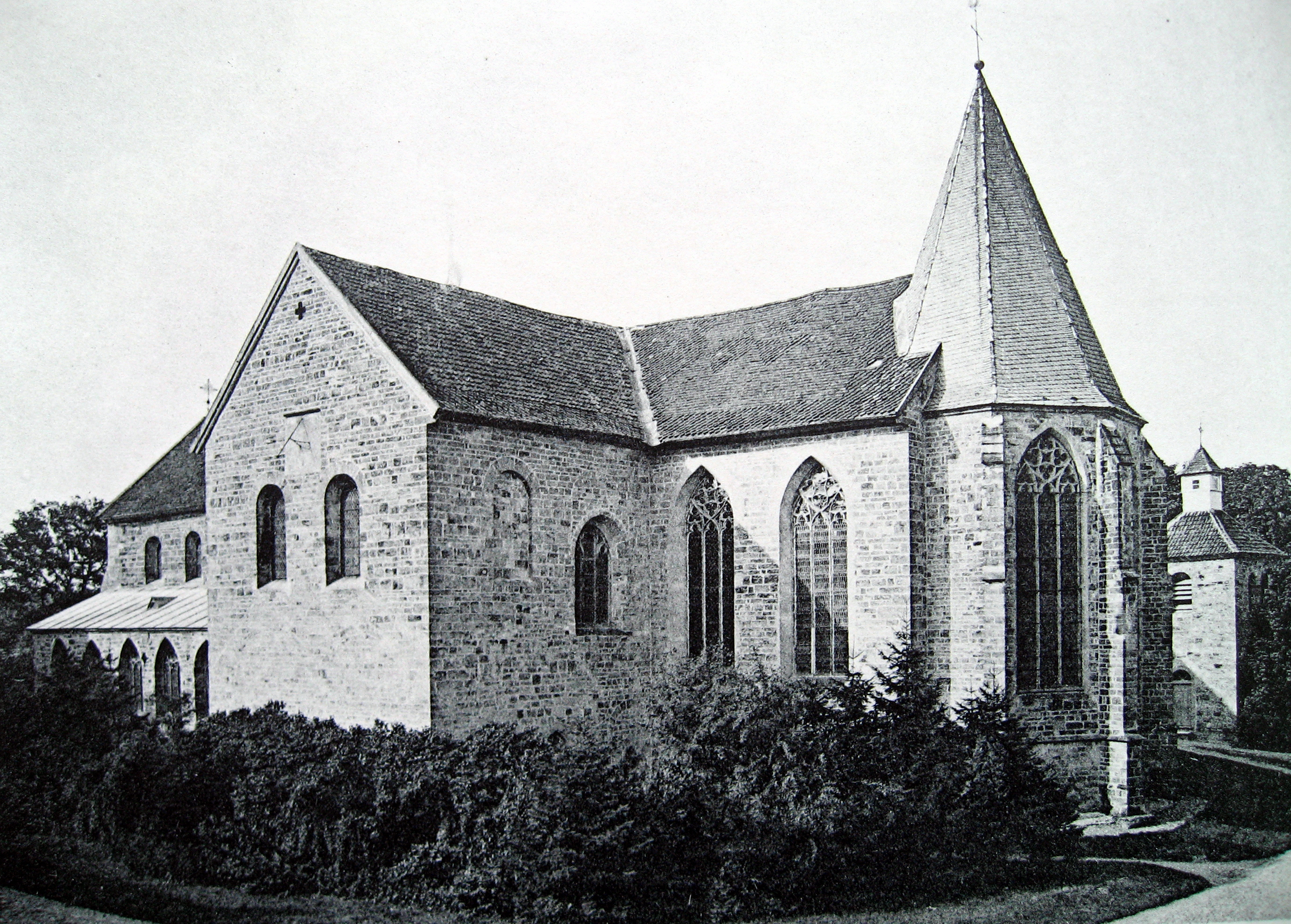 Cappenberg, Kirche, katholisch, romanisch, 12. Jahrhundert, Südost „Dreischiffige (dreijochige) Pfeilerbasilika mit Querschiff und zweijochigem Chor mit gothischem 5/8 Schluß. Ohne Thurm. Einfaches Glockenhaus neben der Nordseite der KKirche. Treppenthurm an der Nordseite des Chors, neu. Ursprünglich flach gedeckt; zu gothischer Zeit mit (verankerten) Kreuzgewölben versehen; im mittleren Joche des Mittelschiffs ein Sterngewölbe. Strebepfeiler vereinzelt.Die rundbogigen Fenster theilweise spitzbogig verbreitert; letztere dreitheilig mit Maßwerk. Drei Eingänge: an der Westseite, an der Nordseite des nördlichen und an der Ostseite des südlichen Querschiffs, ohne Schmuck. An der Ostseite des nördlichen Querschiffs nach außen vortretende Nische (Rest einer halbkreisförmigen Apsis).“